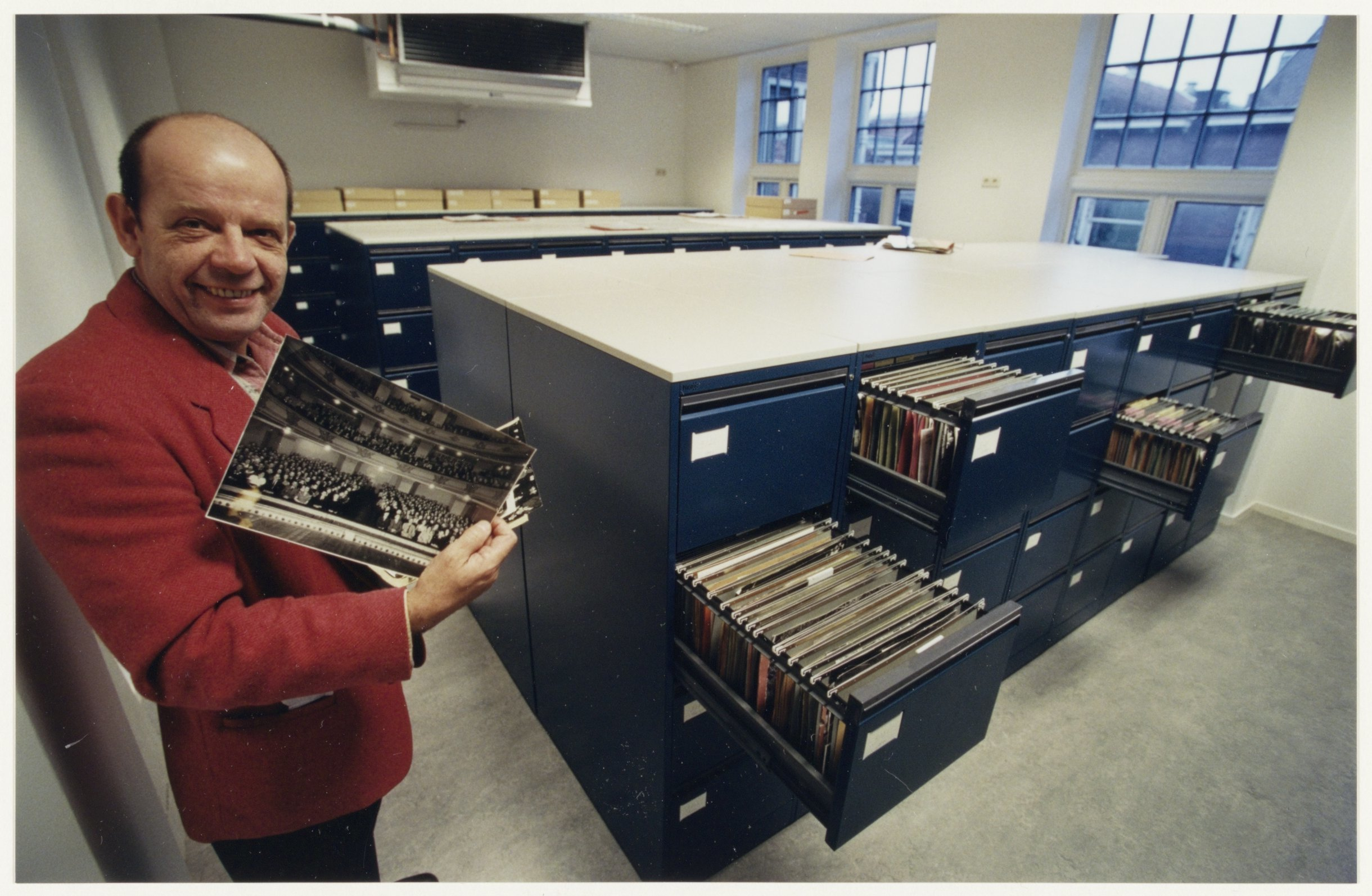 CollectieCollectie Fotoburo de BoerInventarisnummerNL-HlmNHA_54037046NL-HlmNHA_1478_45026kBeschrijvingÉén van de twee goed geoutilleerde archiefruimten van het Spaarnestad Fotoarchief. Beheerder Rob Molenkamp toont opnamen waaruit de historie van de VNU opstijgt.FotonummerNL-HlmNHA_1478_3055DocumenttypePortrettenSoort vervaardigerFotograaf AnnotatiesD60-1HD.161297PersonenMolenkamp, Rob LandNederland ProvincieNoord-Holland GemeenteHaarlem PlaatsHaarlem StraatGroot Heiligland GeografischCentrum Begindatum12-1997Einddatum12-1997TechniekFoto Trefwoordenarchieven, Portretten